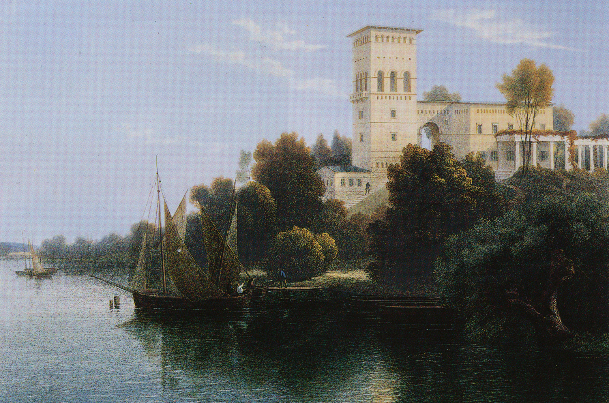 August Haun nach Wilhelm Schirmer, Hofgärtnerhaus Klein Glienicke, Farblithografie um 1840